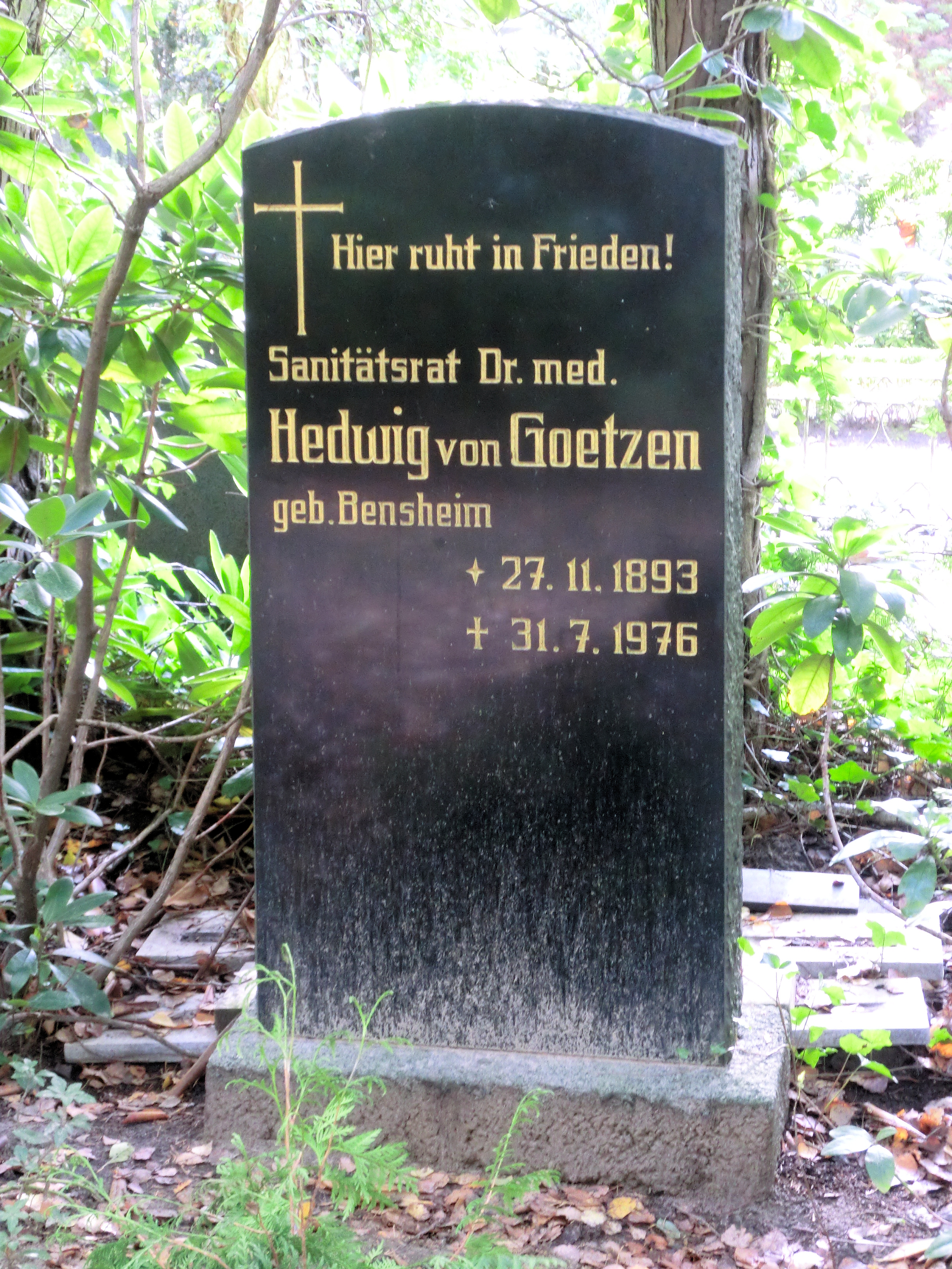 Rostock Neuer Friedhof Hedwig von Goetzen